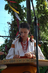 Бут Оксана, Країна мрій-2006